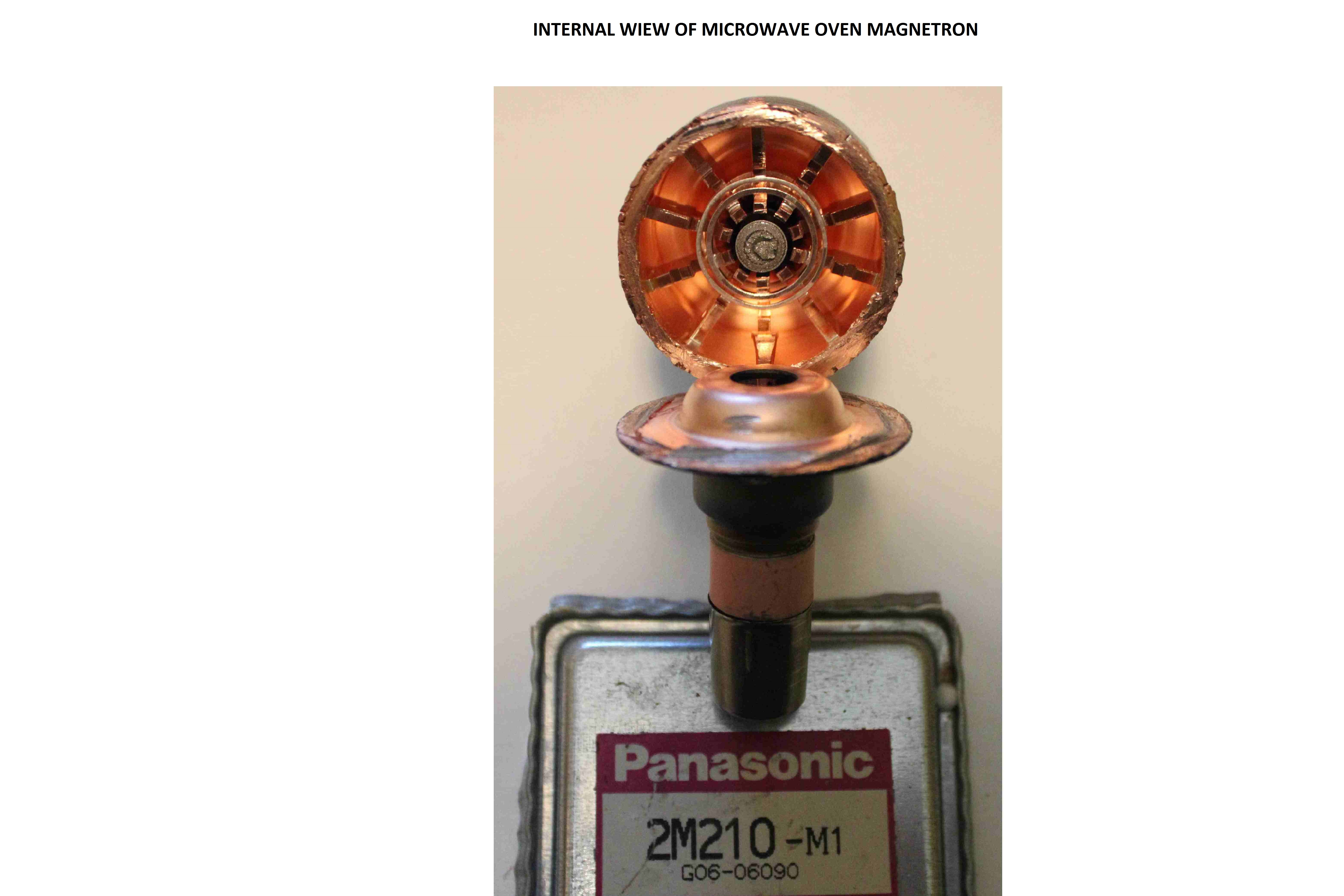 Vista interna di un MAGNETRON per forno a microonde